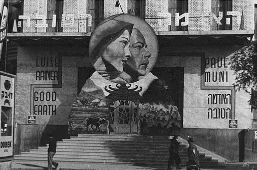 הסרט האדמה הטובה, מוגרבי בקולנוע מוגרבי